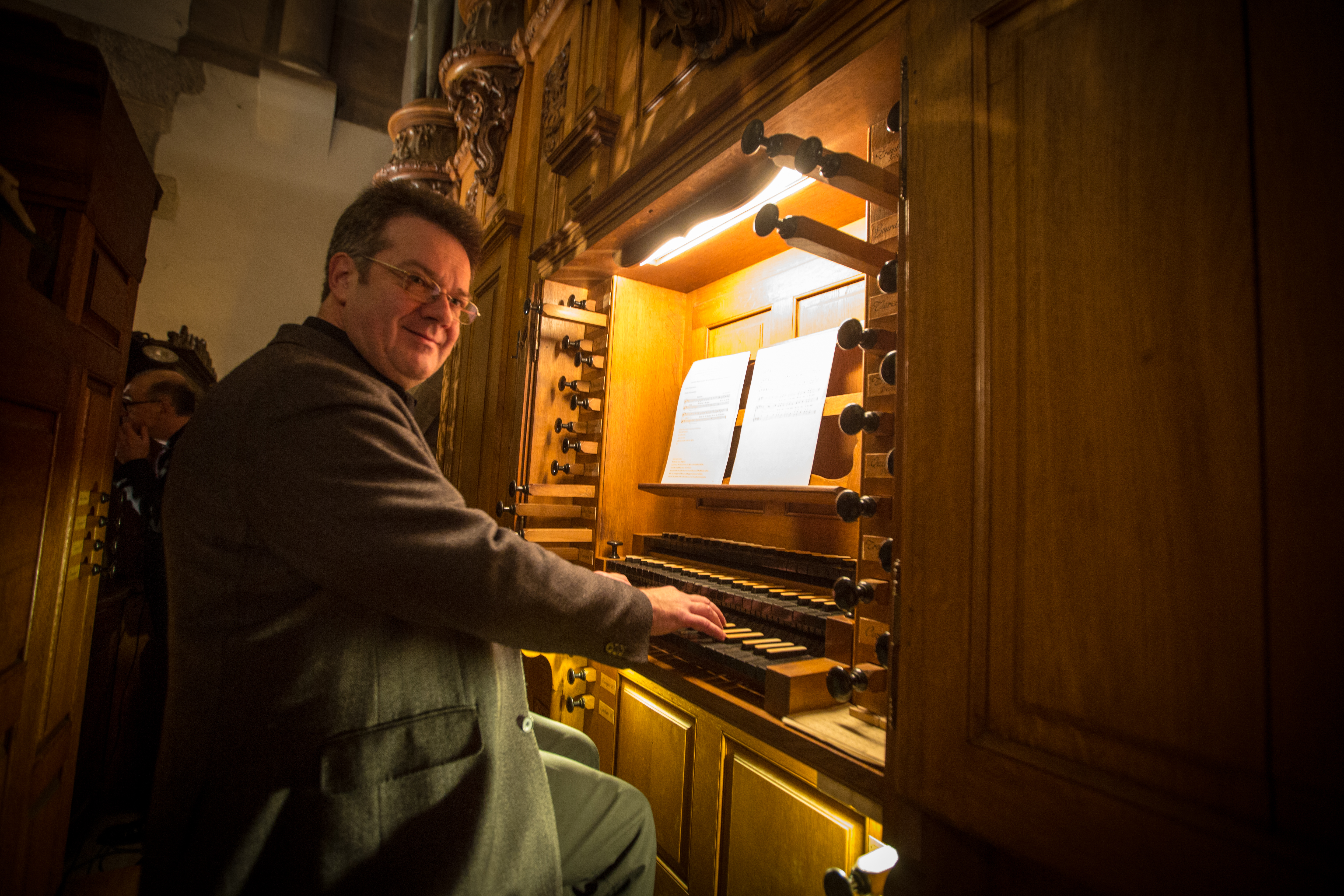 L’organiste Daniel Maurer au clavier de l’orgue Silbermann pendant le culte d’installation de M. Christian Albecker comme président de l’Église protestante de la Confession d’Augsbourg d’Alsace et de Lorraine en l’église Saint-Thomas de Strasbourg le 9 février 2014.